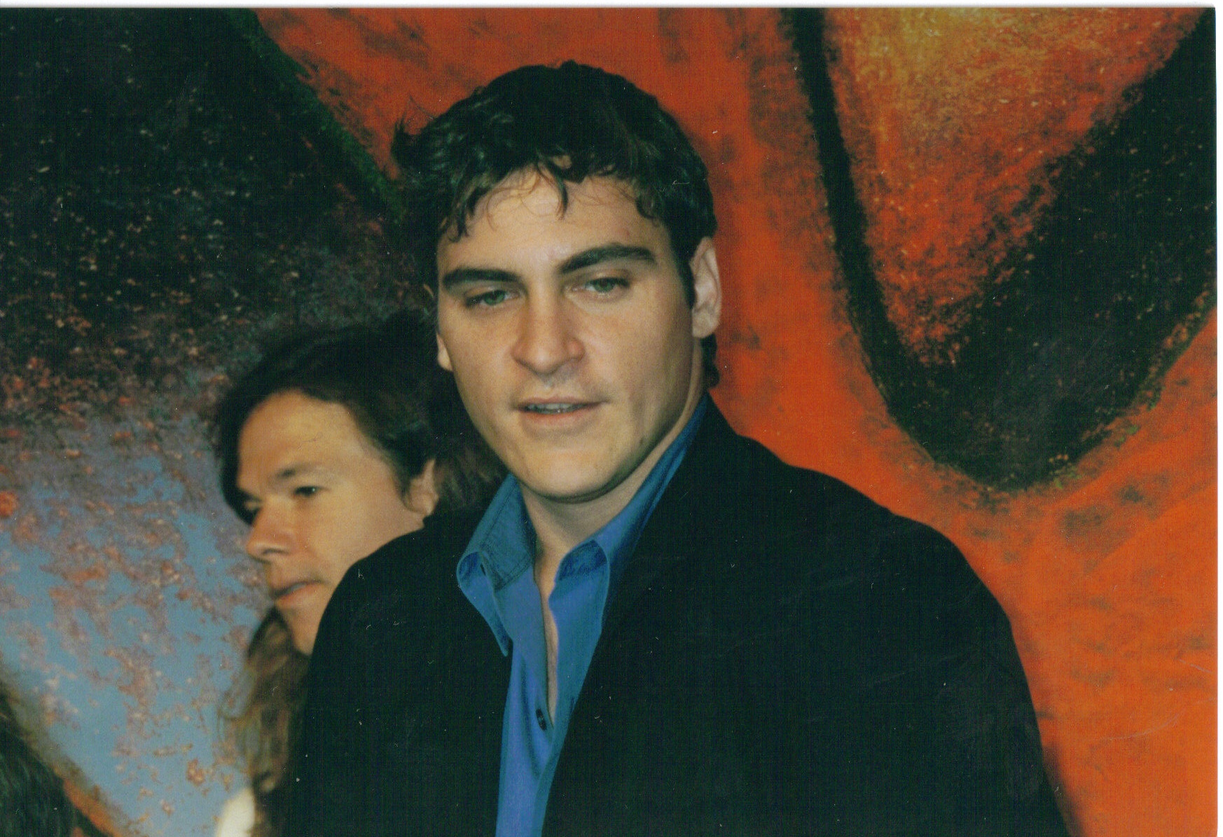 Joaquin Phoenix, Cannes 2000